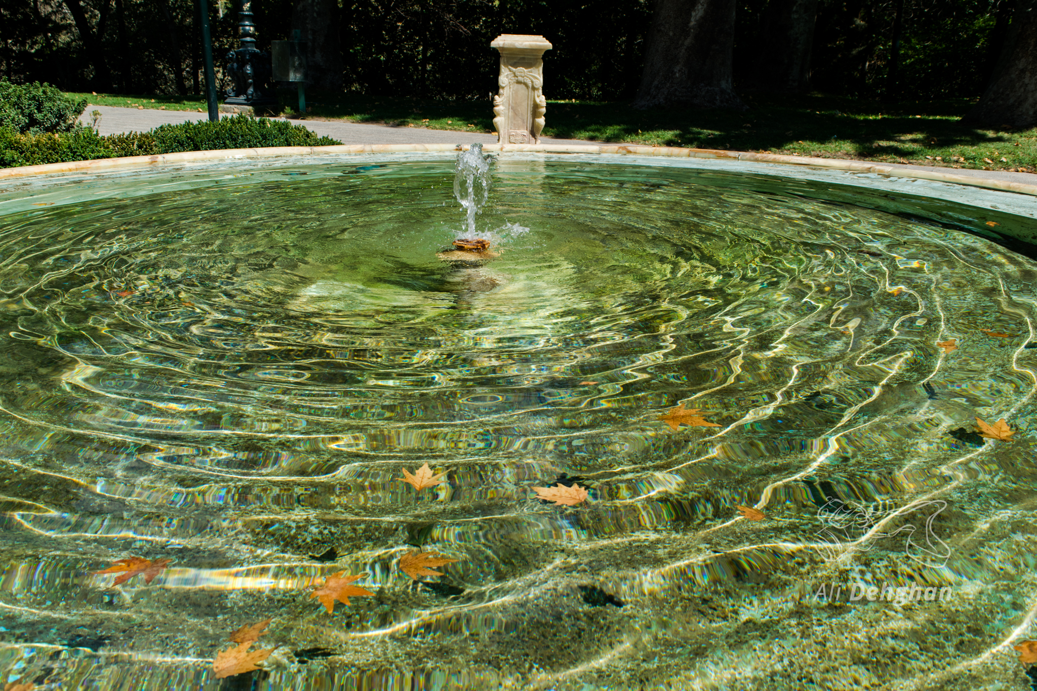 حوض کاخ سبز از مجموعه کاخ های سعد آباد